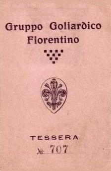 Premier volet d'une carte (tessera, en italien) du groupe goliardique florentin, années 1926-1927.